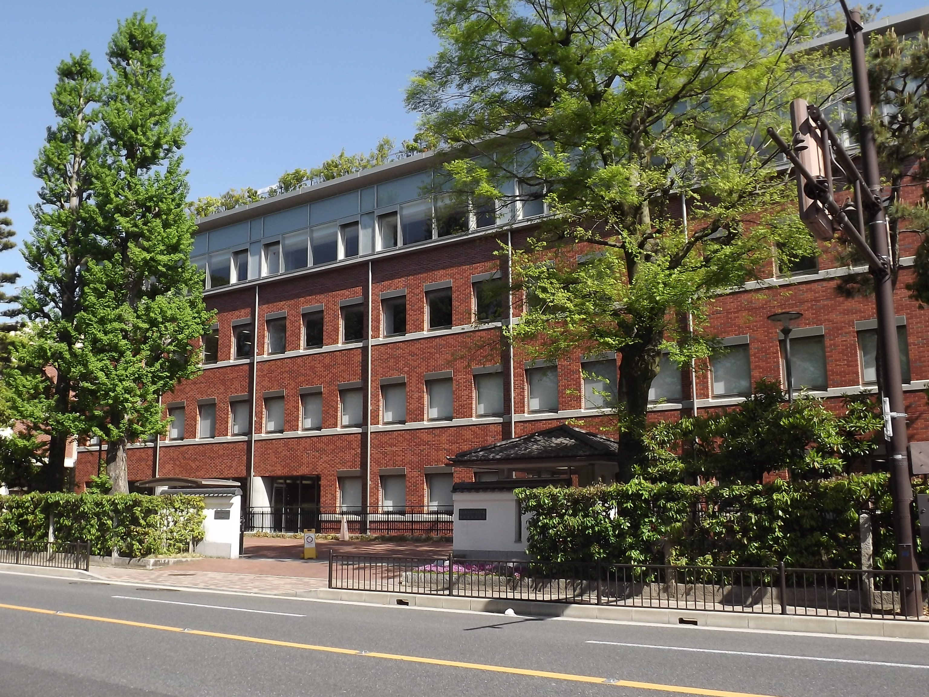 同志社女子大学純正館